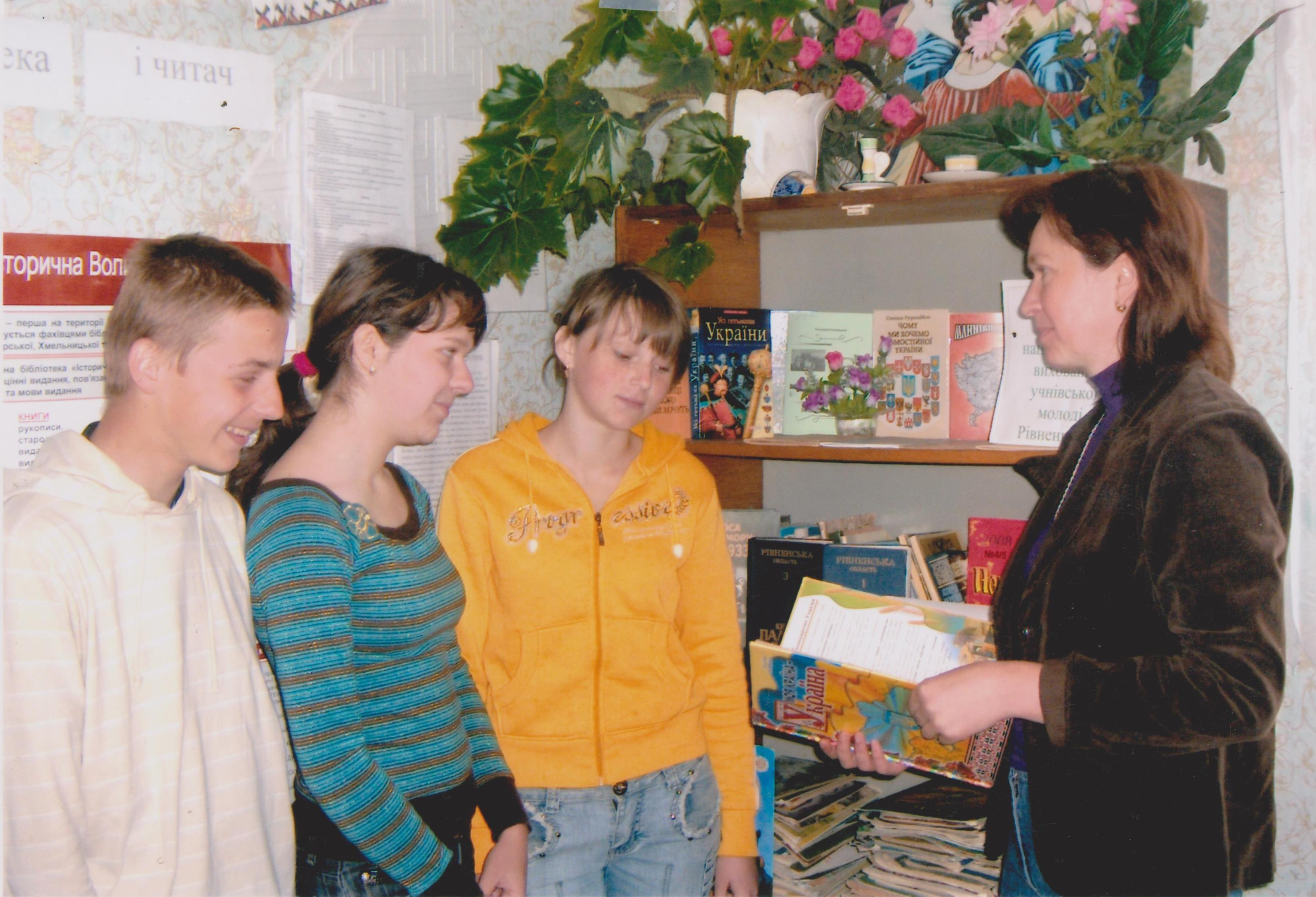 У бібліотеці